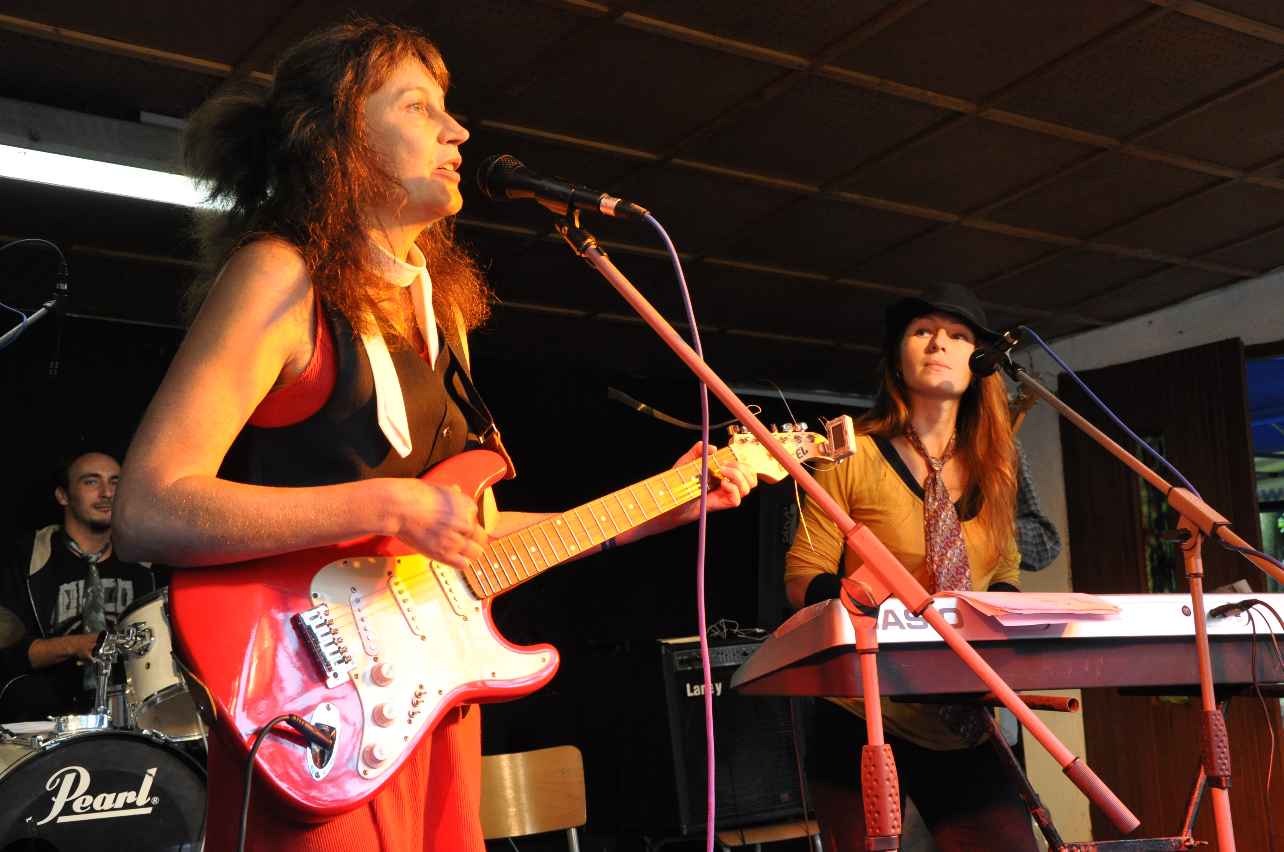 Mužy, festival Otevřeno, Jimramov 2010